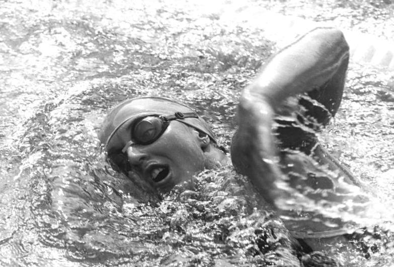 Barbara Krause ADN-ZB Kluge 10.07.80 Berlin: "Im Gespräch für Olympia"- Barbara Krause gehört zu den erfolgreichsten Freistilschwimmerinnen der DDR. Der 21jährige Oberwachtmeister der VP war 1975 Mitglied der Weltmeisterstaffel über 4 x 100 m Freistil und 1978 Weltmeister über 100 m Freistil. Der Berliner Dynamo-Sportler- hier eine Studie während des Trainings- ist mehrfache DDR-Meisterin über 100 und 200 m, Weltrekordlerin über 100 m und Europarekordhalterin über 200 m Freistil. -Zweiteilige Serie! Siehe auch Motiv W 0710-14 n mit weiterne Textangaben